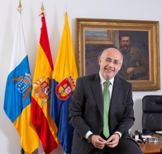 Antonio Morales Méndez en foto oficial